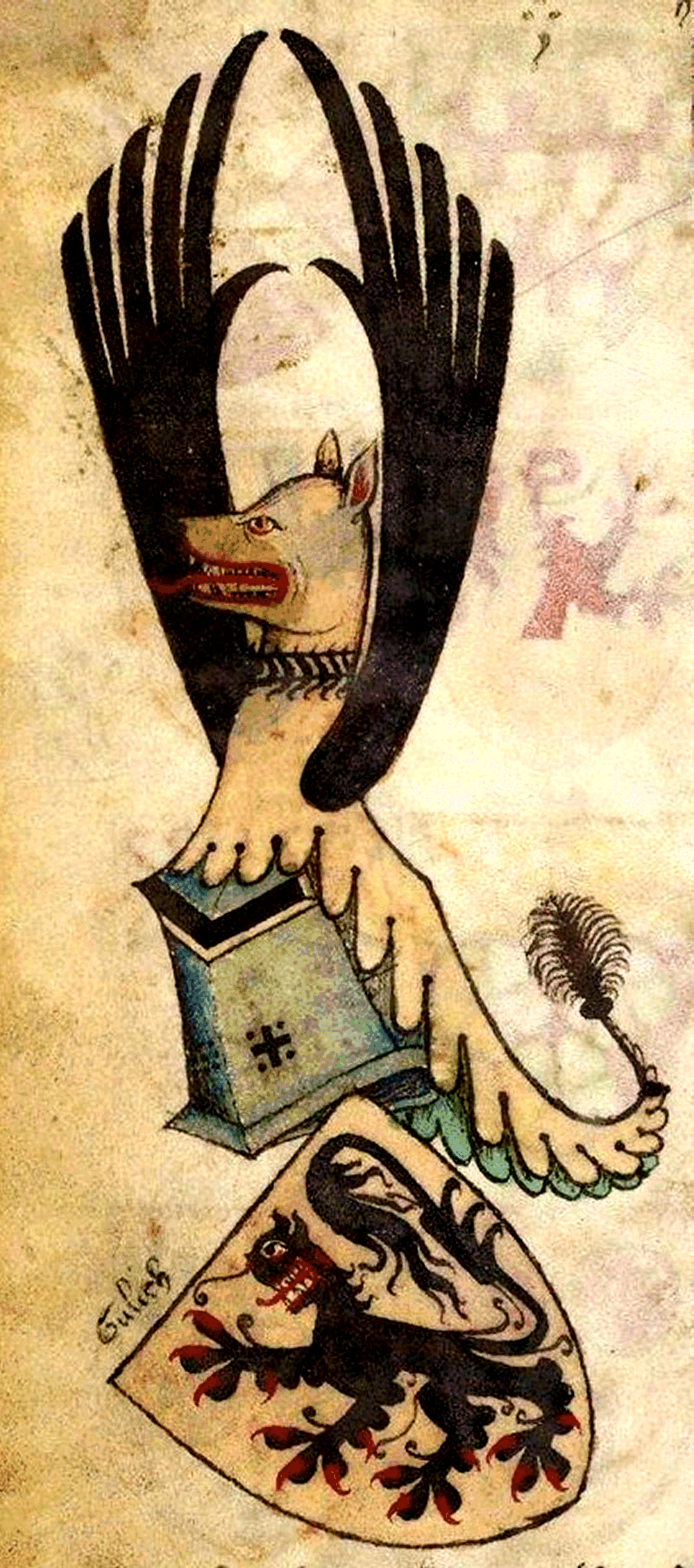 Stammwappen der alten Grafen und Herzöge von Jülich.